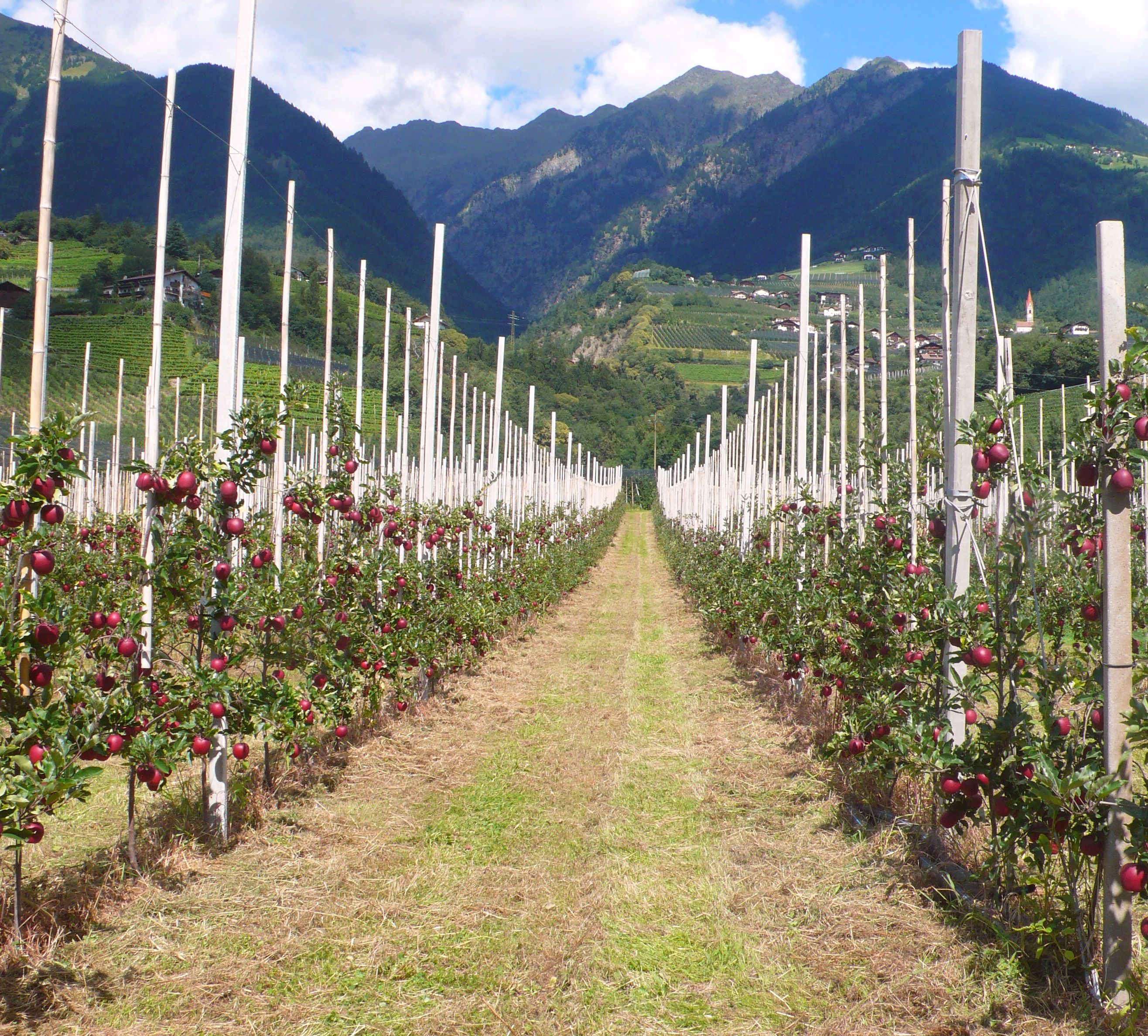 Merano